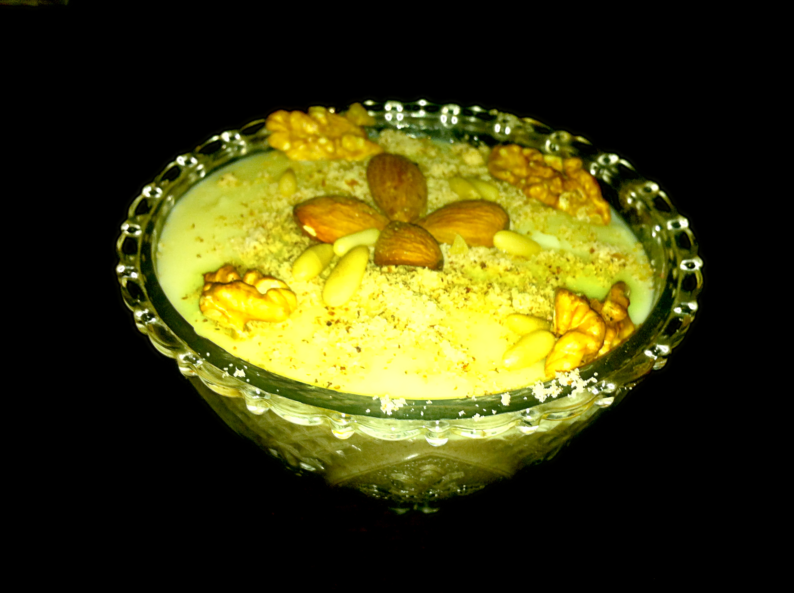 Dessert « Assidat Zgougou » spécialement préparé pour la fête du Mouled en Tunisie